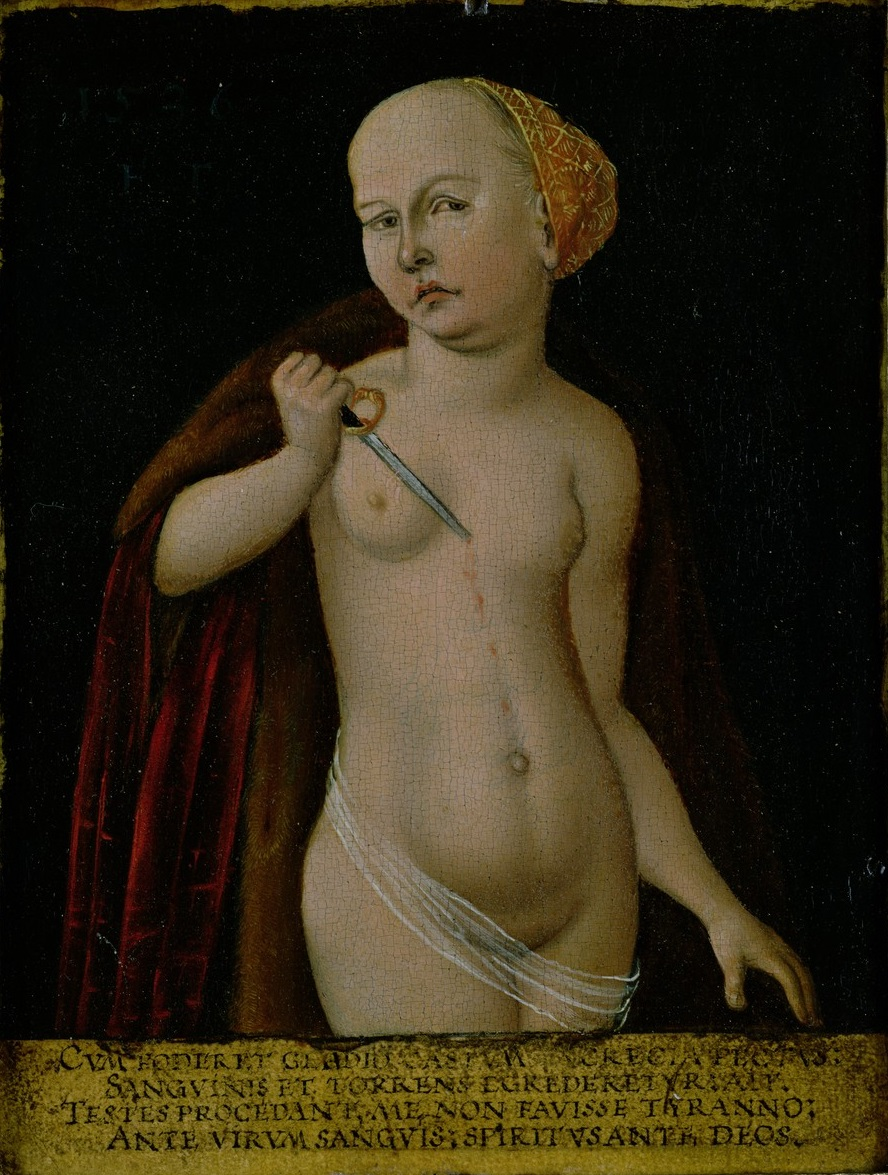 Lucretia